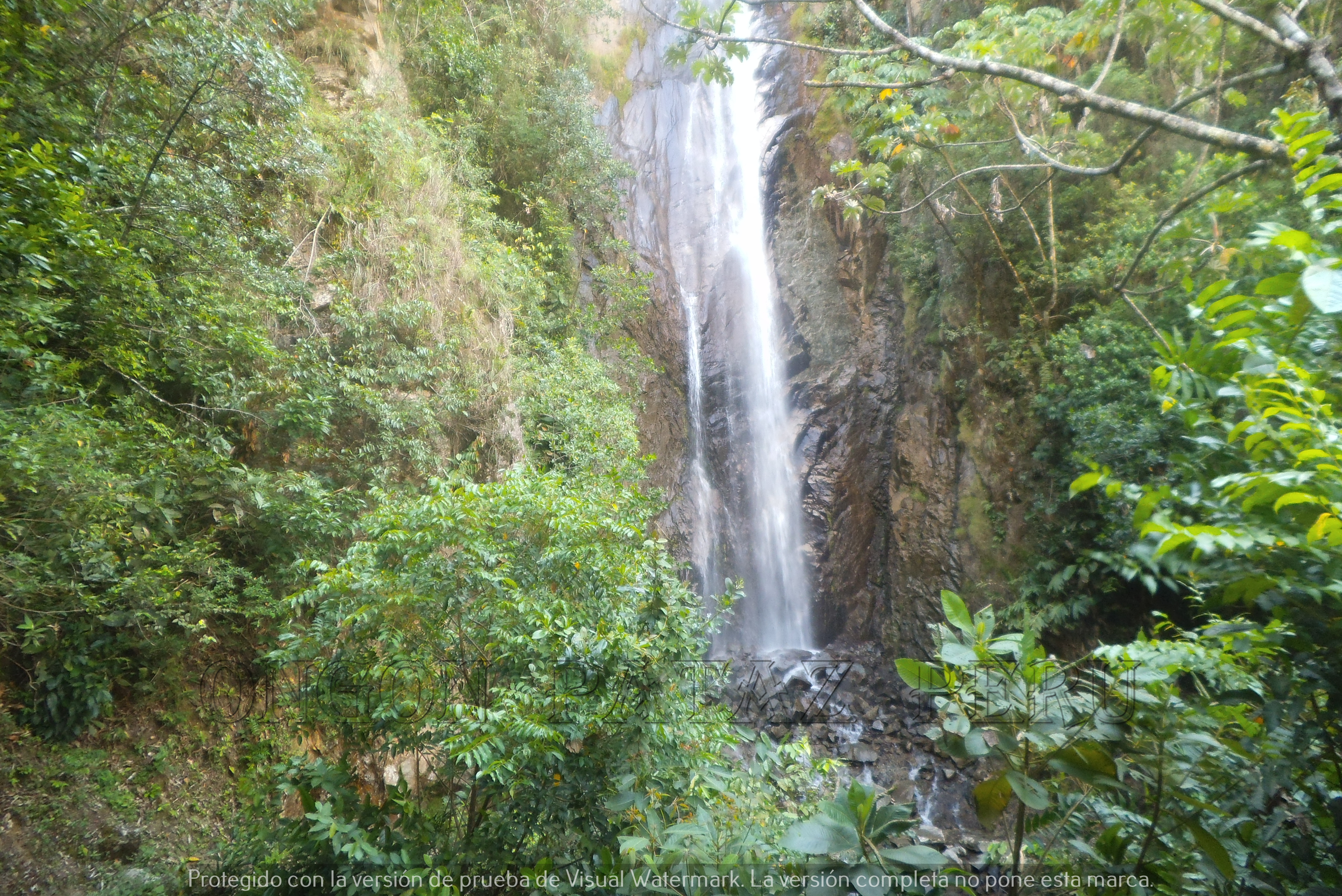 Hermosa catarata ubicado en el Anexo de Pampaseca - Distrito de Ongon - Provincia Pataz - Departamento La Libertad. Que se puede observar al paso de la carretera Ongon - Tayabamba